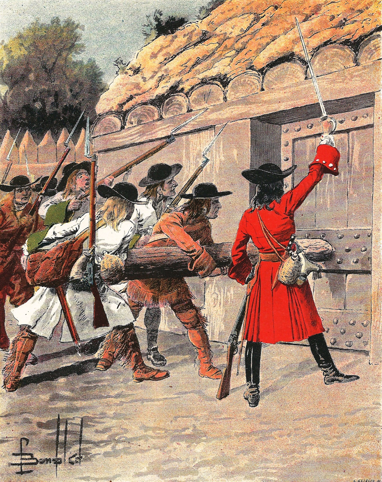 Attaque du fort Monsipi par d'Iberville Illustration tirée de l'Histoire de la Nouvelle France d'Eugène Guénin